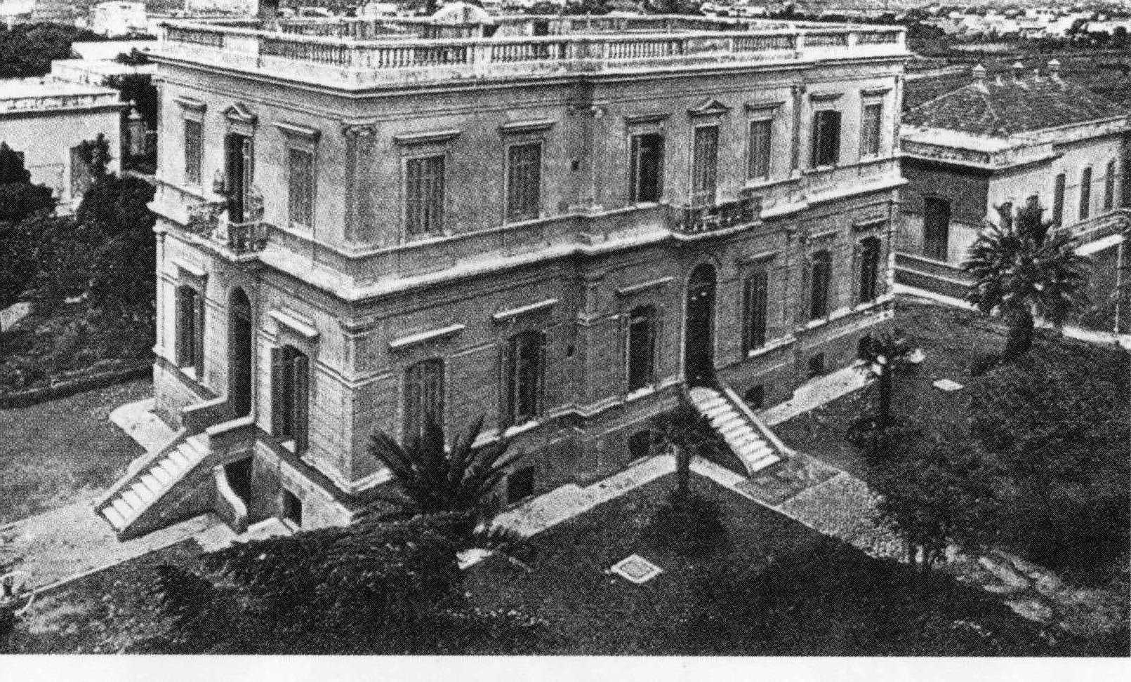 Foto del antiguo Hospital Rosario (circa 1910), luego sede del edificio de administración del HECA hasta su traslado en 2008.